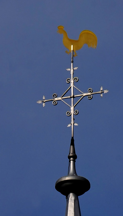 Kirchturmhahn der evangelischen Kirche in Saarburg (Bez. Trier)